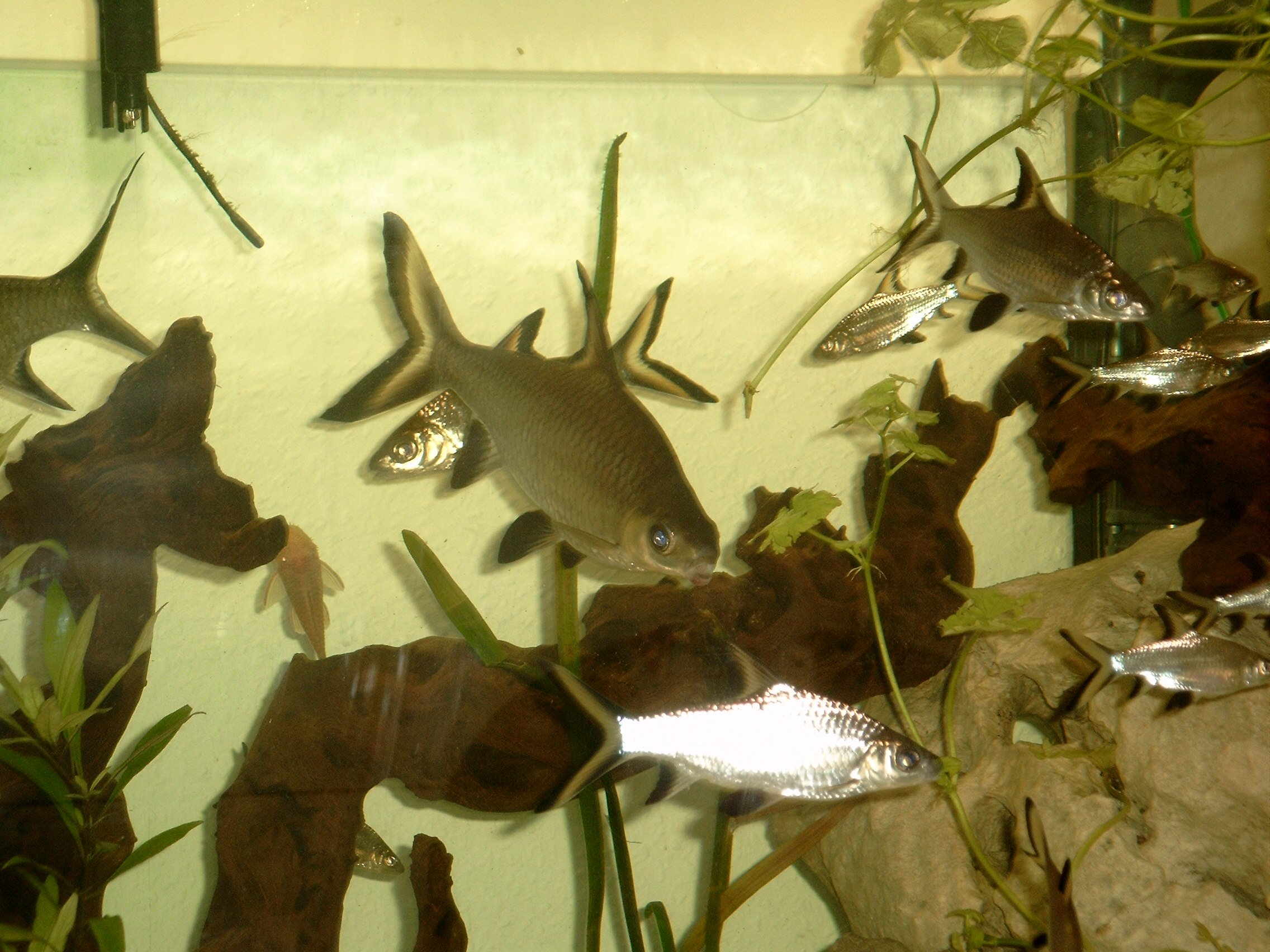 Haibarbe (Balantiocheilos melanopterus), Schwarm im 800 Liter Becken